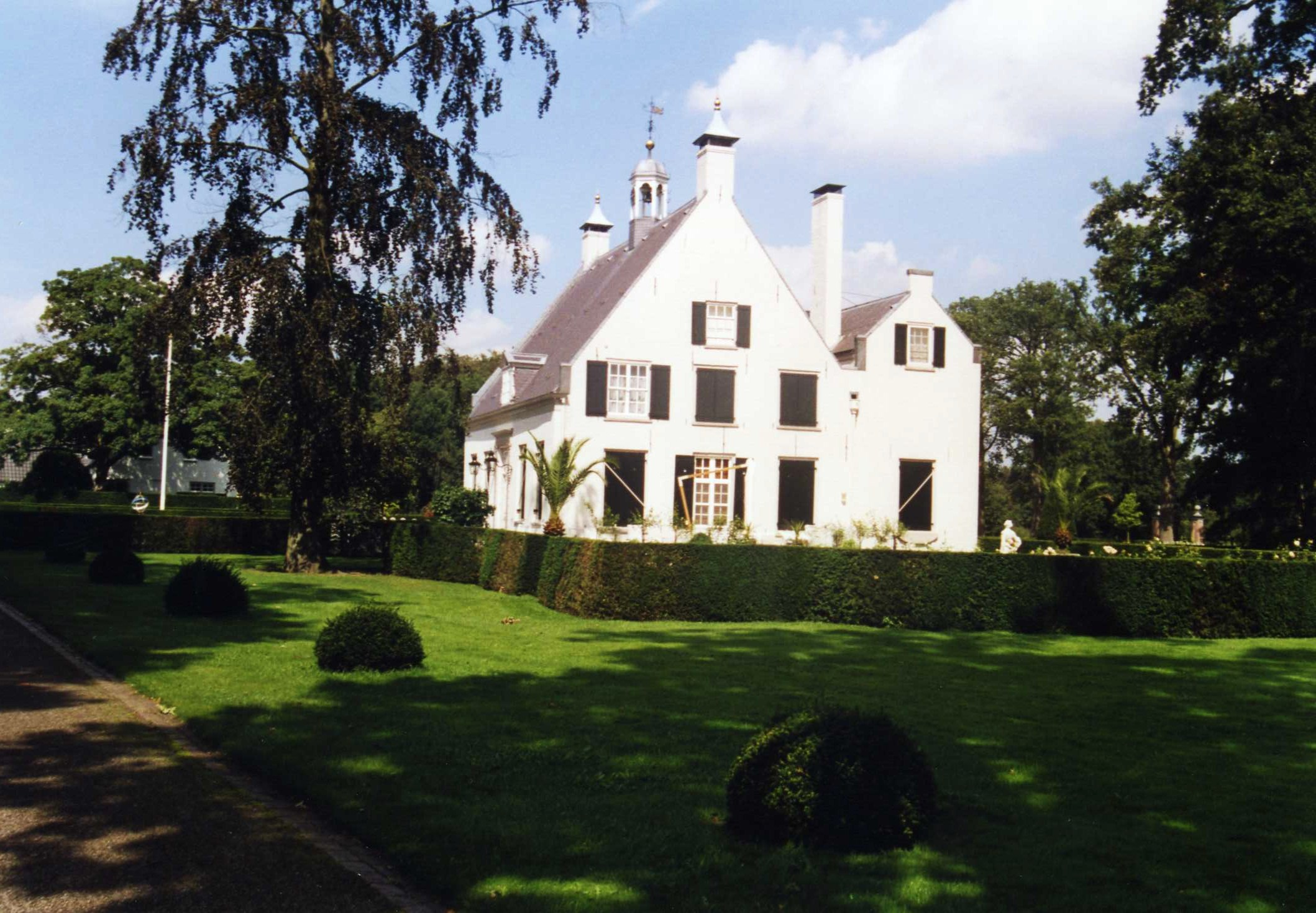 't Huis te Baest te Oostelbeers.